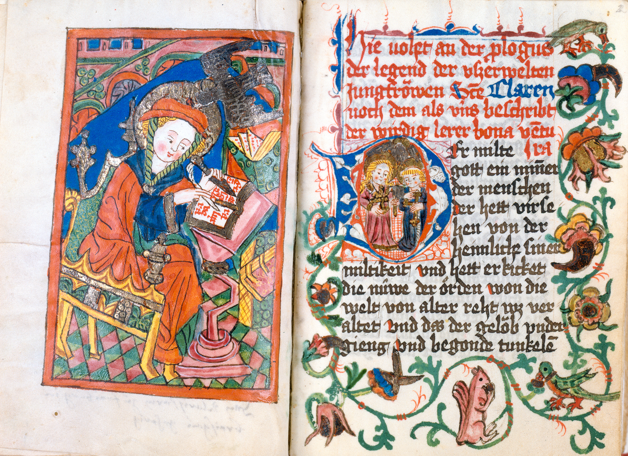 1v: Schreiberbild (Evangelist Johannes?) 2r: Initiale D, Heilige Klara, Heiliger Franziskus Badische Landesbibliothek, Karlsruhe, Codex Tennenbach 4, Doppelseite: fol. 1v-2r.